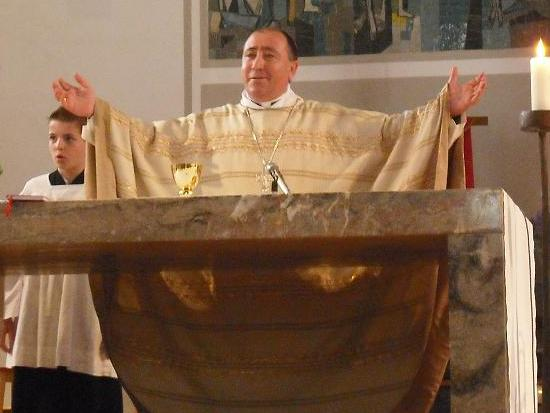 Ipeshkvi Kosovës, Mons. Dodë Gjergji